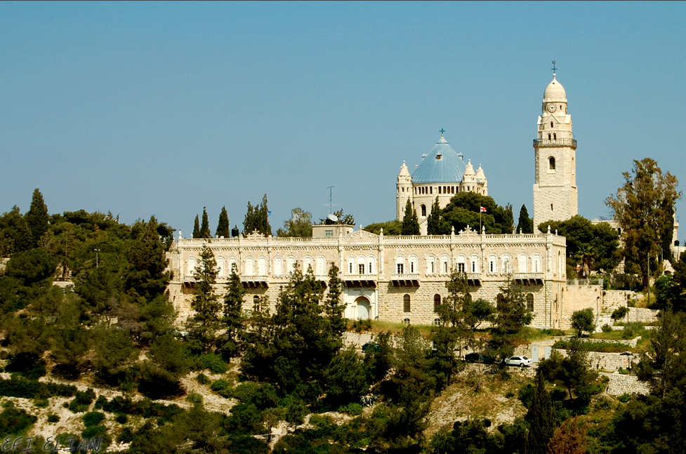 כנסיית הדורמיציון בירושלים